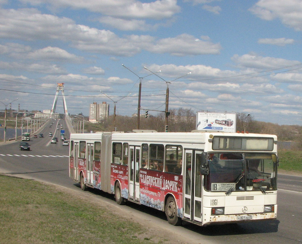 АКА-6226 маршрута №18 на Октябрьском проспекте.